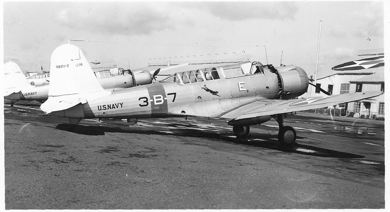 Oakland, CA, 1940.